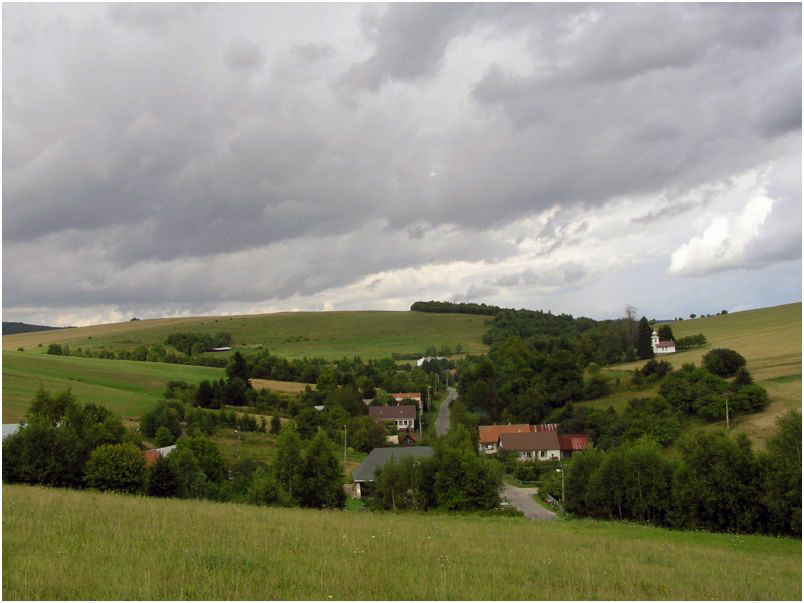 Celkový pohľad na Belejovce